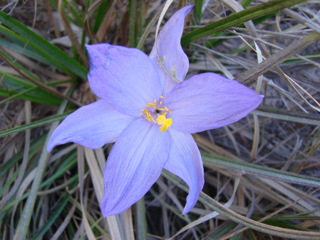 Vellozia angustifolia Goethart & Henrard - VELLOZIACEAE - Parque Estadual da Serra dos Pirineus - Pirenópolis - Goiás - Brasil.